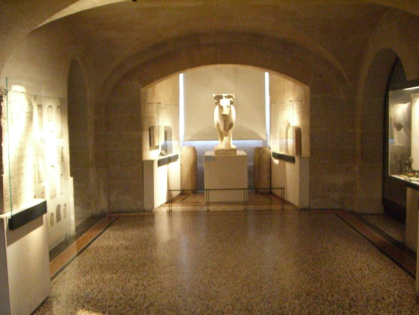 Vue de la crypte du Sérapéum du Musée du Louvre.